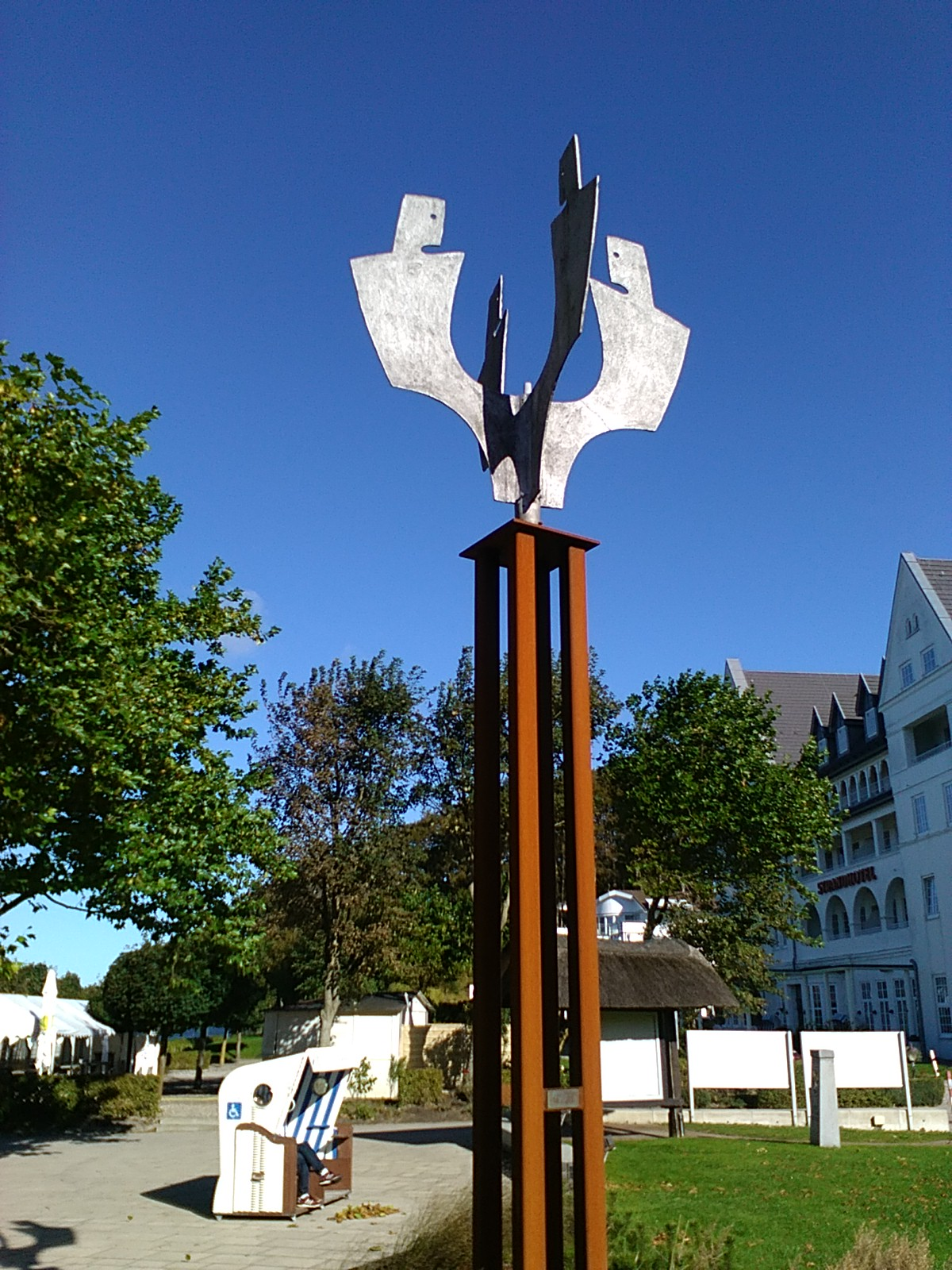 Skulptur "Windspiel" (1974) des Bildhauers Siegbert Amler, Standort: Strandpromenade in Glücksburg (Ostsee), Schleswig-Holstein